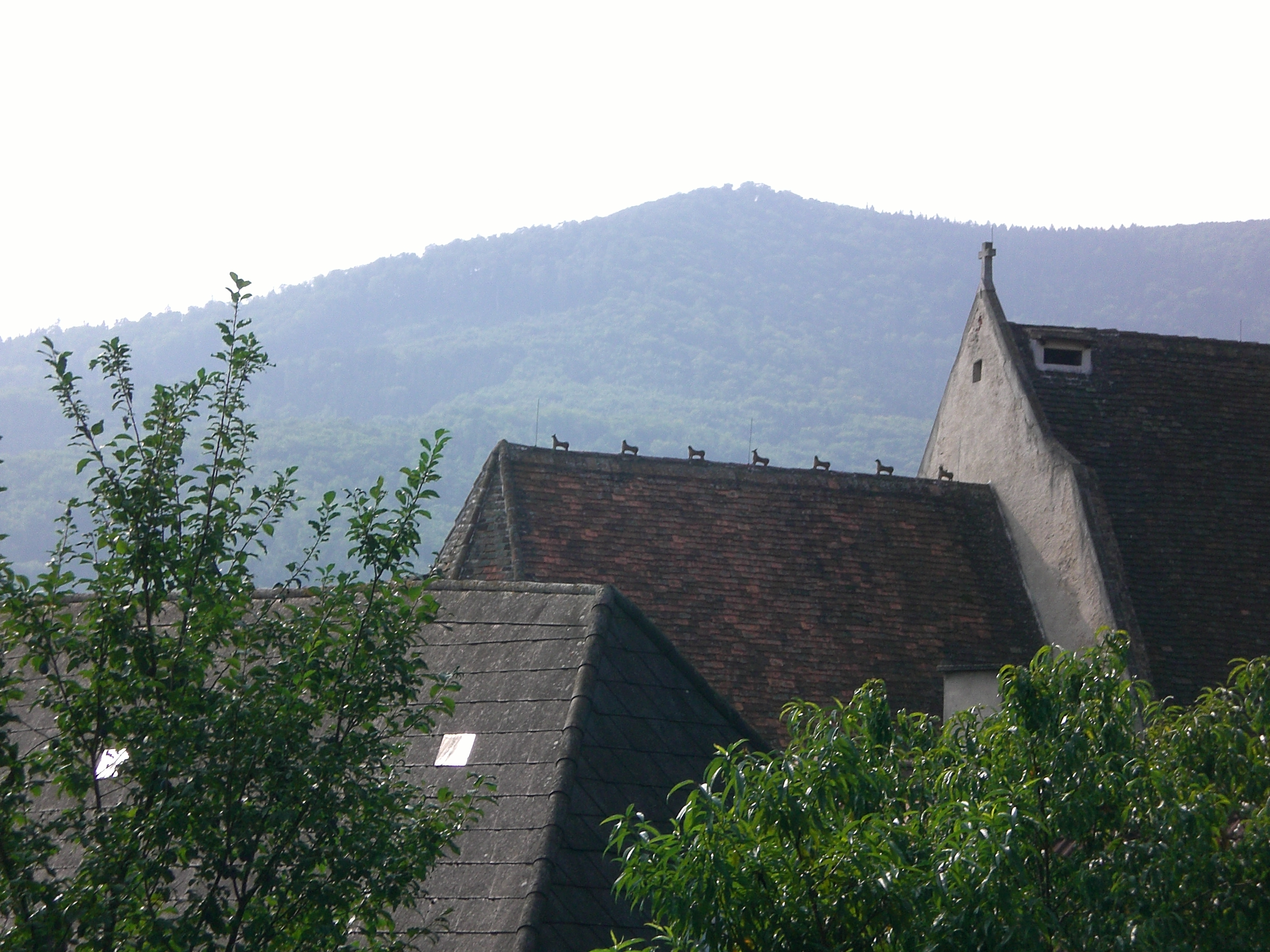 sogenannte Hasen (Terrakottafiguren von Hirschen und Pferden - Kopien) auf dem Dachfirst des Presbyteriums der Filialkirche in St. Michael, Weißenkirchen in der Wachau, Niederösterreich